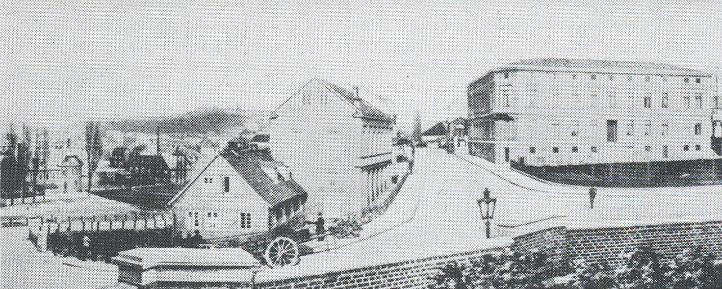 Wuppertal Hotel Kaiserhof in den 1860er